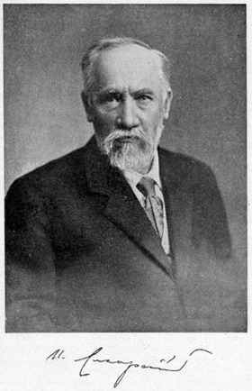 Профессор Иван Алексеевич Сикорский Professor Ivan Alexeevish Sikorsky